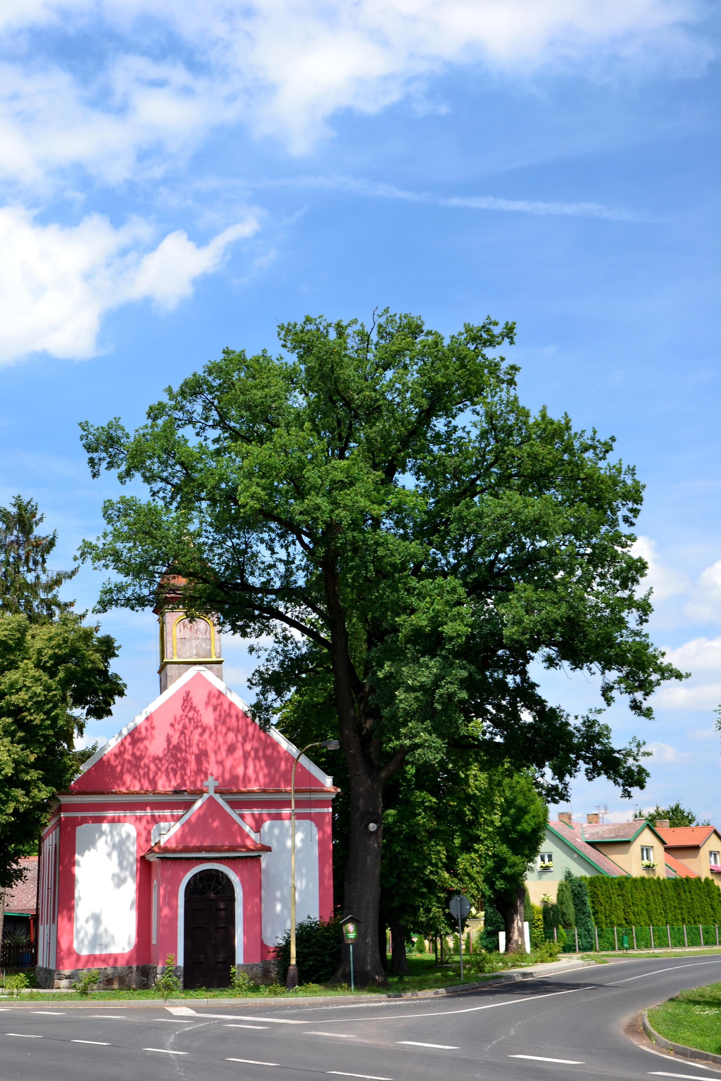 Račetice - památný dub u evangelické kaple